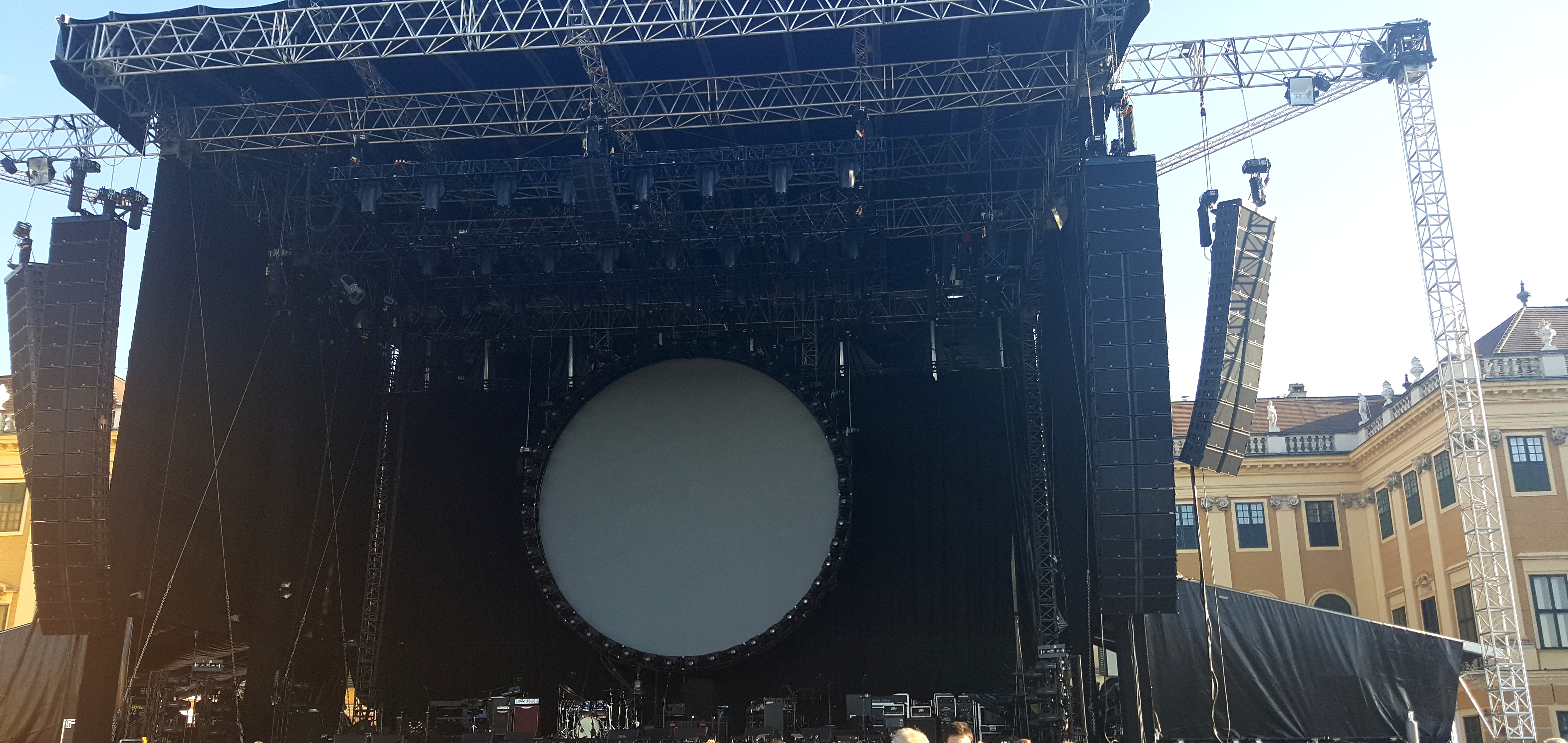 David Gilmour - 28.6.2016 Viedeň, Schonnbrunn